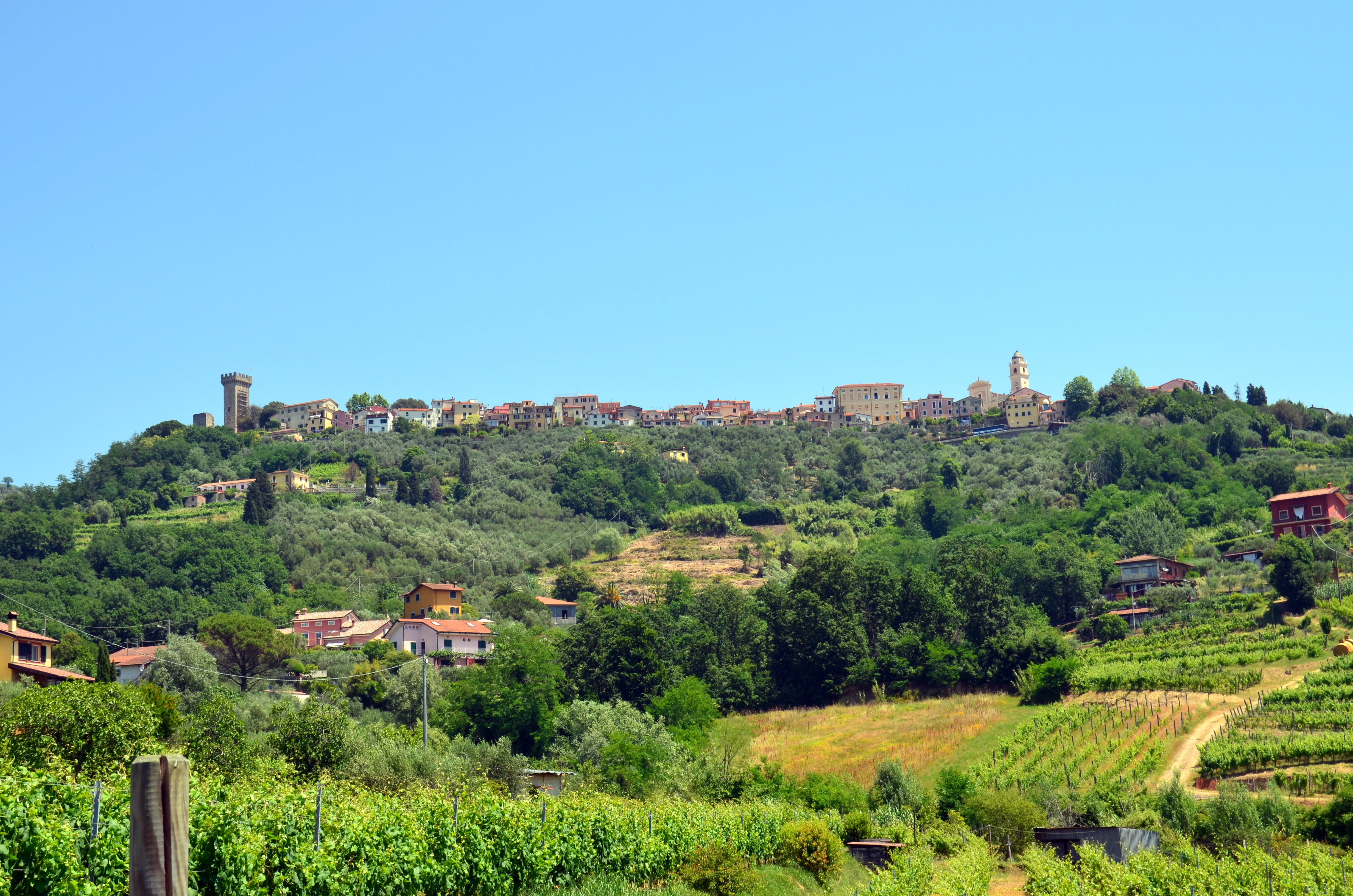 Serie di immagini del centro storico di Castelnuovo Magra, Liguria, Italia